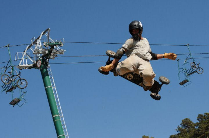 Championnats de france de Mountain Board Freestyle à la Moulière (06750) le 30 août 2008